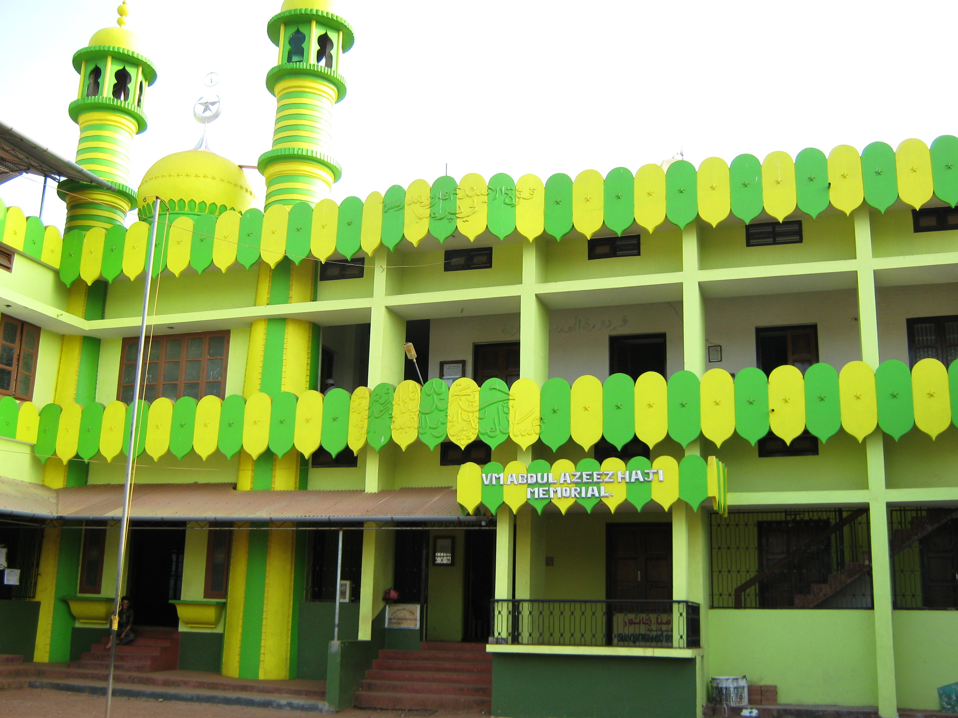 Quvvathul Islam Madrassa. , Taliparamba, Kerala, India.